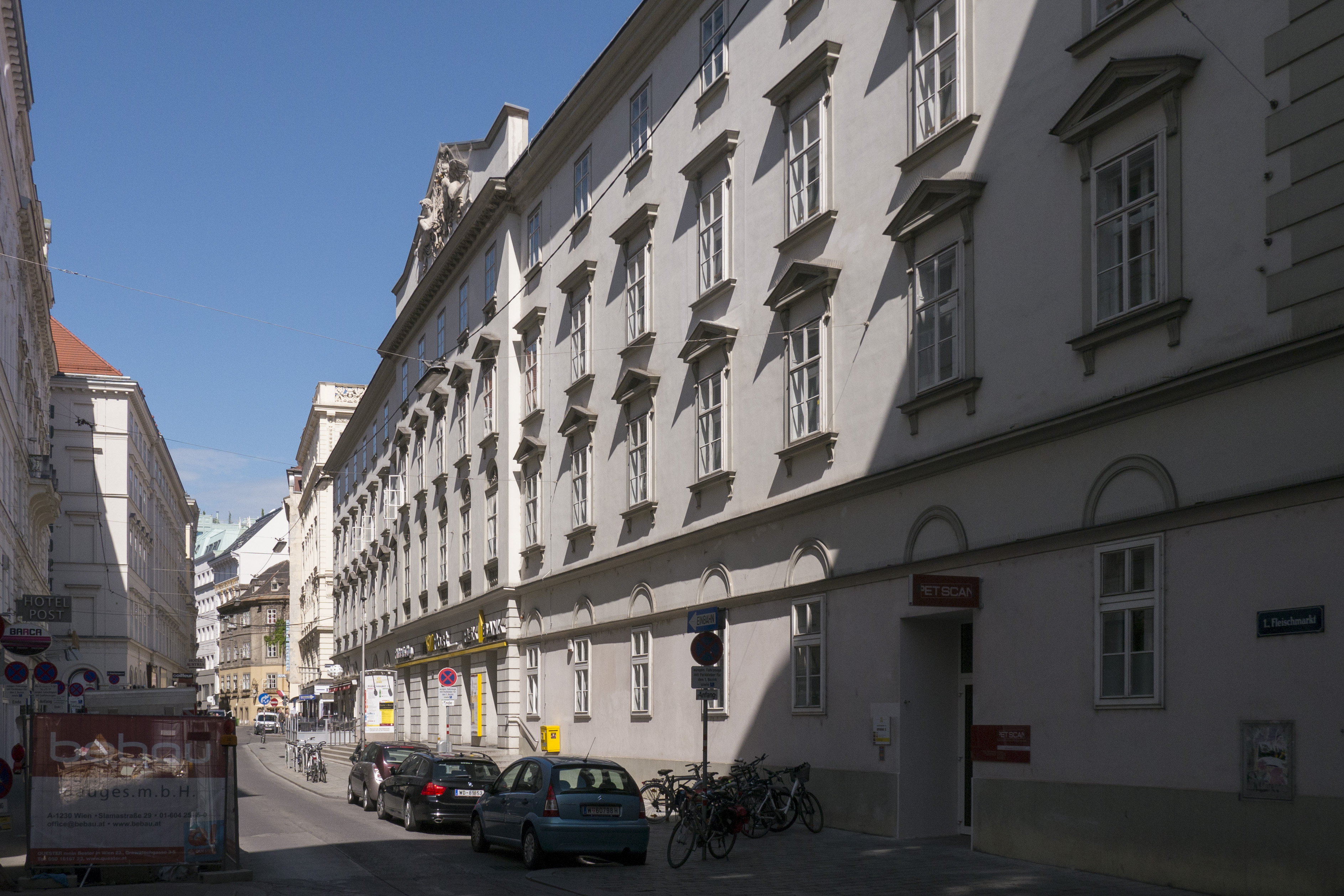 Hauptpost, ehem. Laurenzergebäude